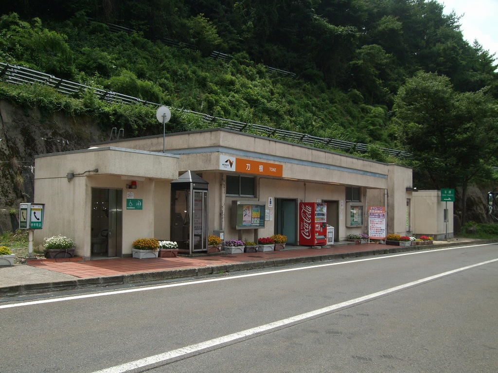 北陸自動車道 刀根パーキングエリア（下り線・新潟方面）